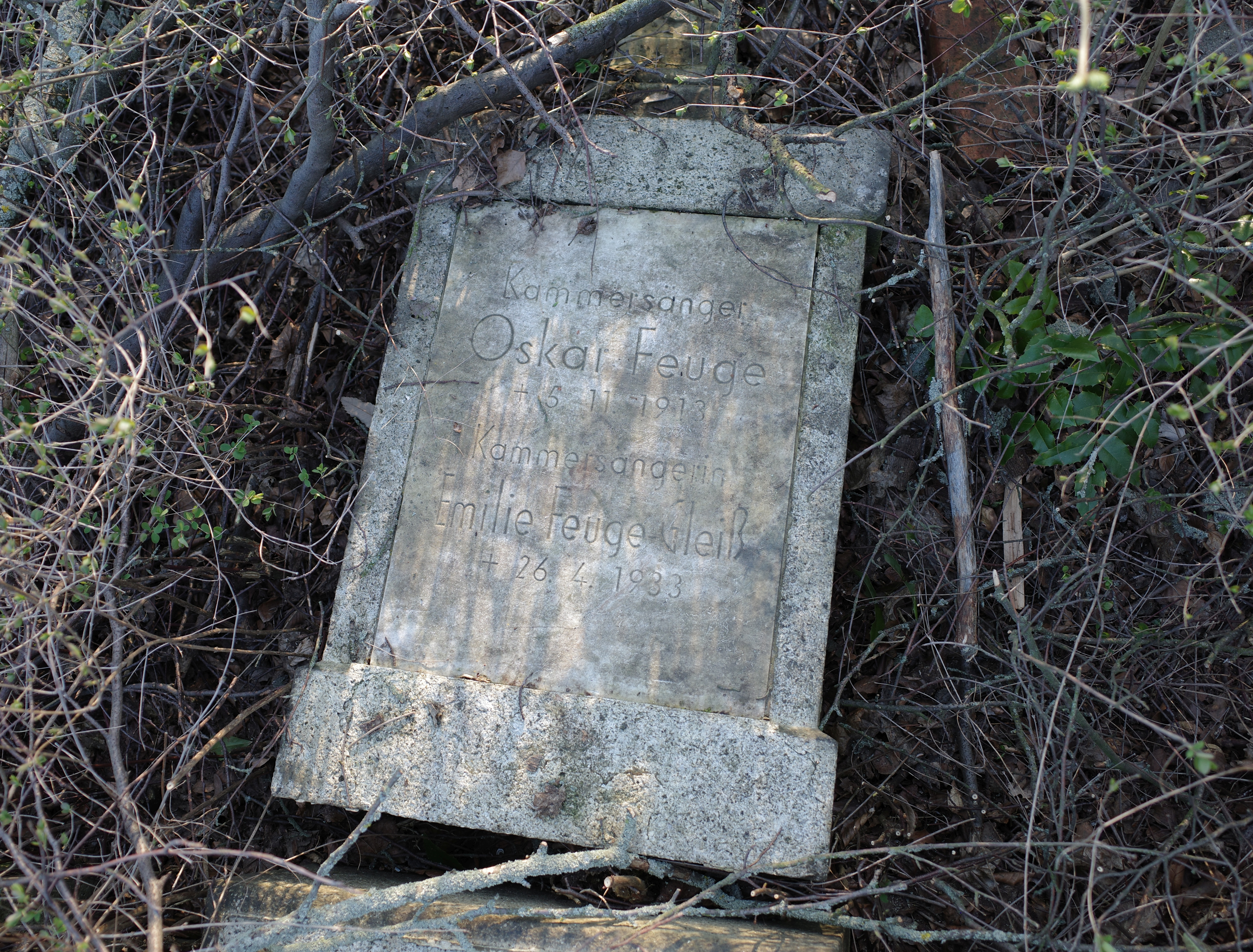 Dessau, Friedhof 3. Ruhestätte von Oskar Feuge und Emilie Feuge-Gleiß.